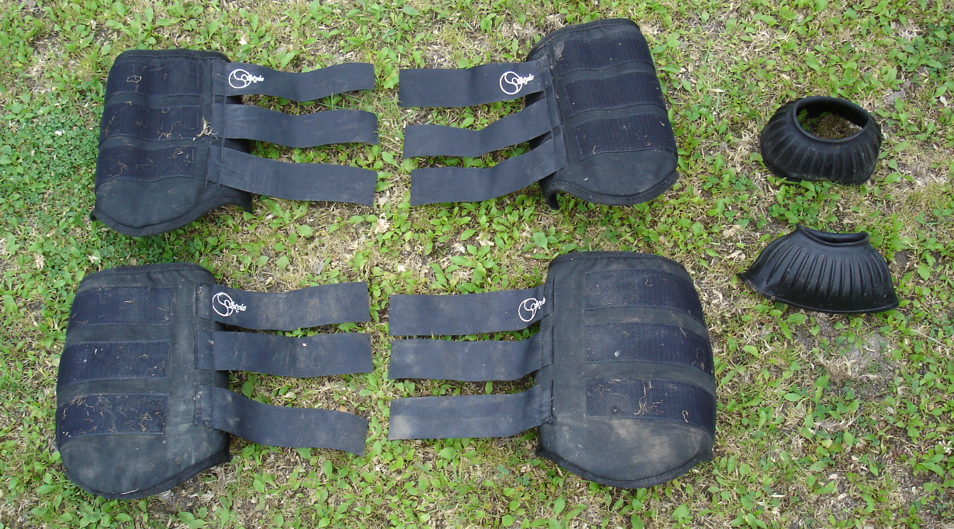 Protections utilisées lors d'un concours complet d'équitation sur le cross